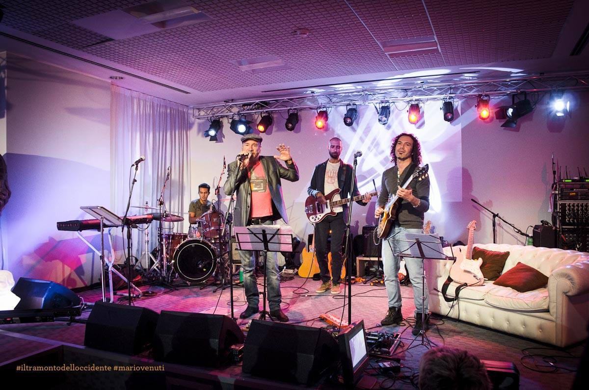 Mario Venuti e la sua band ospiti a Webnotte